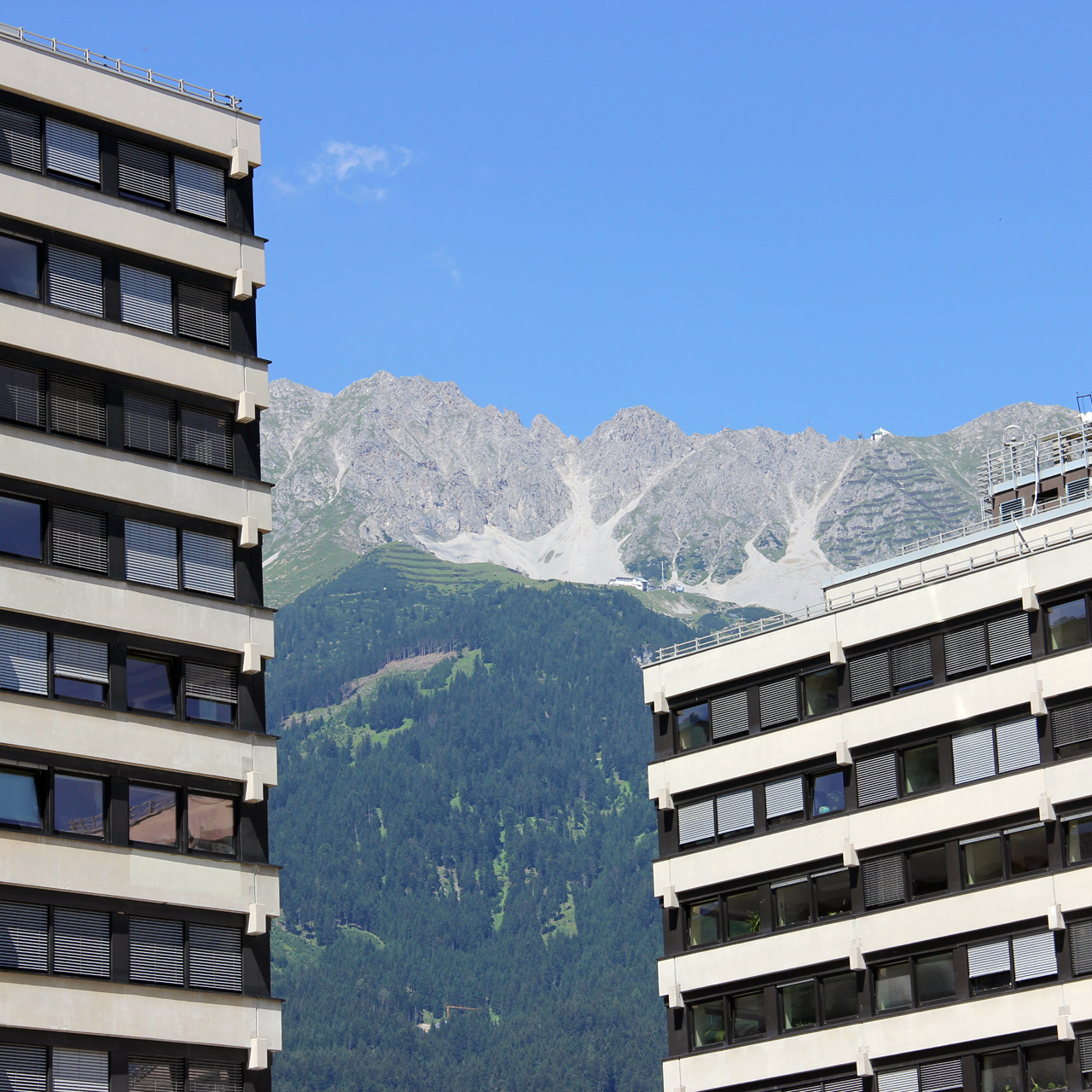 Blick vom Geiwi-Vorplatz in Richtung Nordkette mit dem Geiwi-Turm (li.) und dem Bruno-Sander-Haus (re.) der Universität Innsbruck.